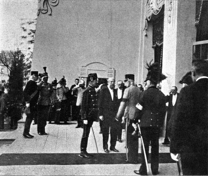 Der Kaiser besucht die Jubiläumsausstellung 1898, im Gespräch mit Anton (von) Harpke (en face)